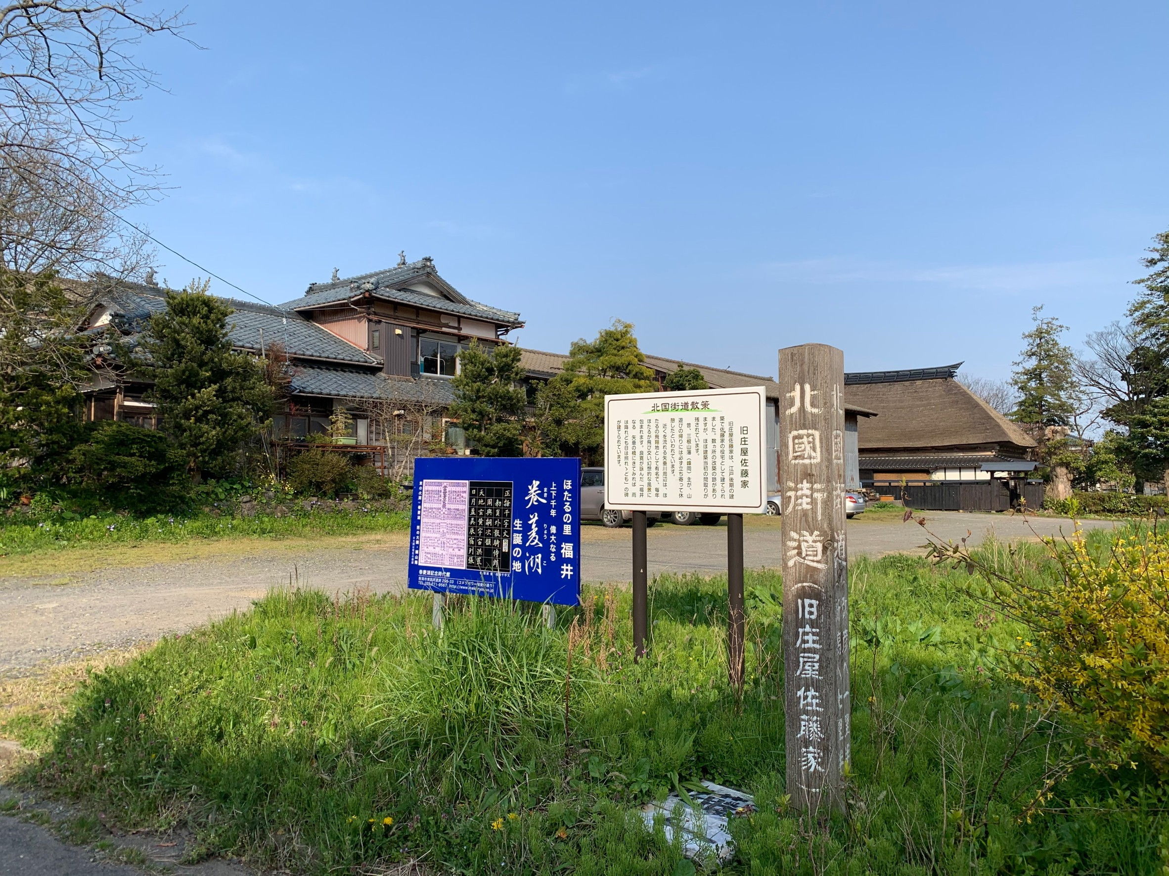 北国街道・福井集落 旧庄屋・佐藤家（新潟市西蒲区，2020年4月）